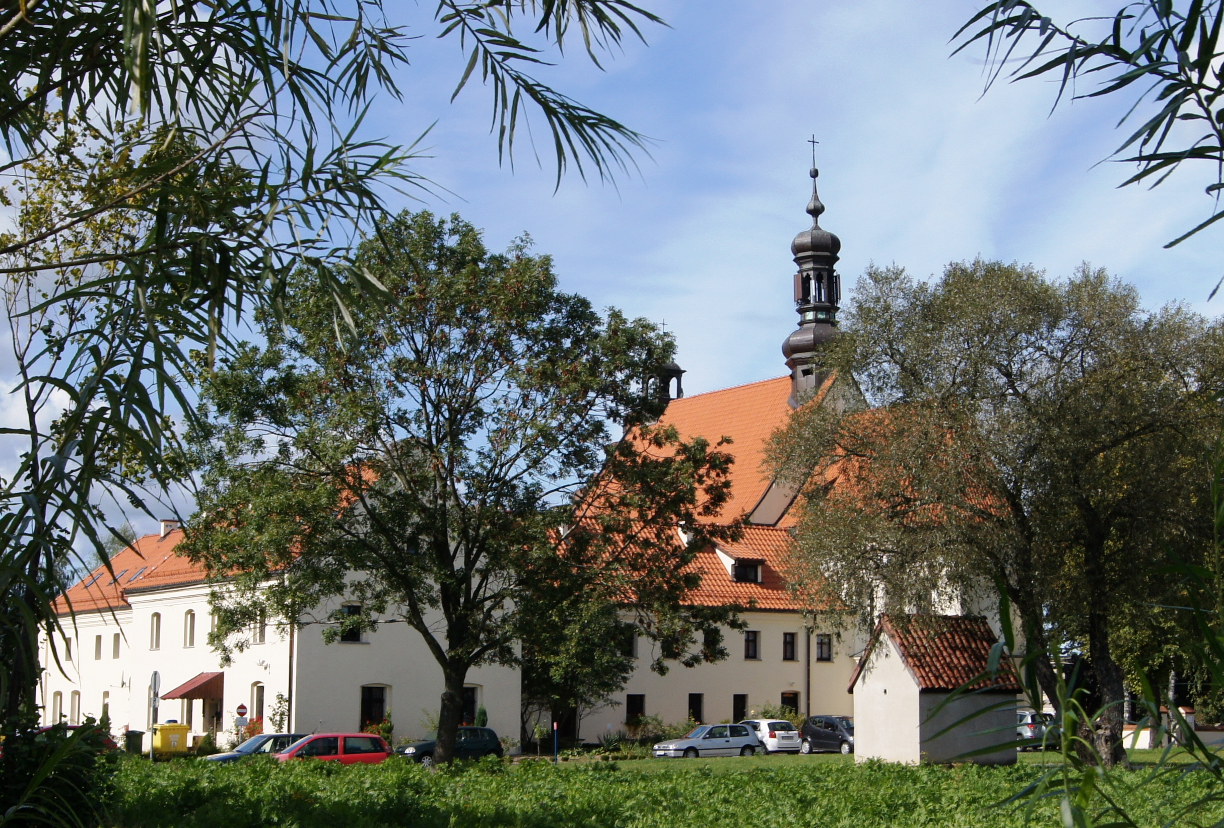 Toruń Podgórz, ul. Poznańska 49 - zespół klasztorny poreformacki: - kościół, obecnie parafialny pw. św. Apostołów Piotra i Pawła, 1644 r., XVIII w. - klasztor, obecnie plebania oraz klasztor franciszkanów, poł. XVII, XVIII w. zabytek nr A/402